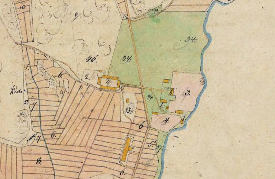 Mälbys huvudbebyggelse: 1. Mangården 2. Ladugård 3. Trädgård 4. Trädgård 6. Ett "stort fält" -- 34. Park -- 46. Fårhagen